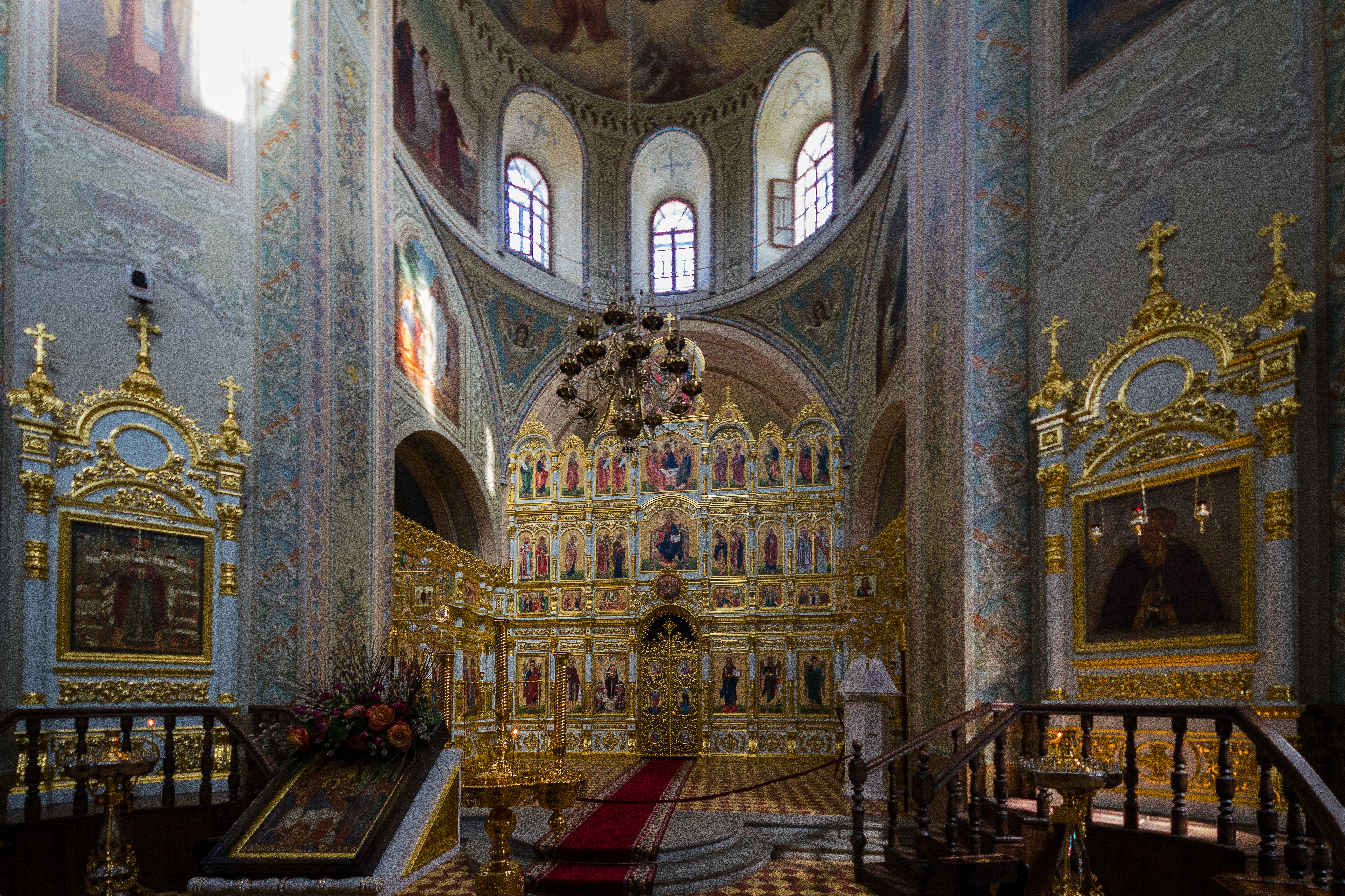 Собор Всех Скорбящих Радость: Свияжск, Зеленодольский район, Татарстан